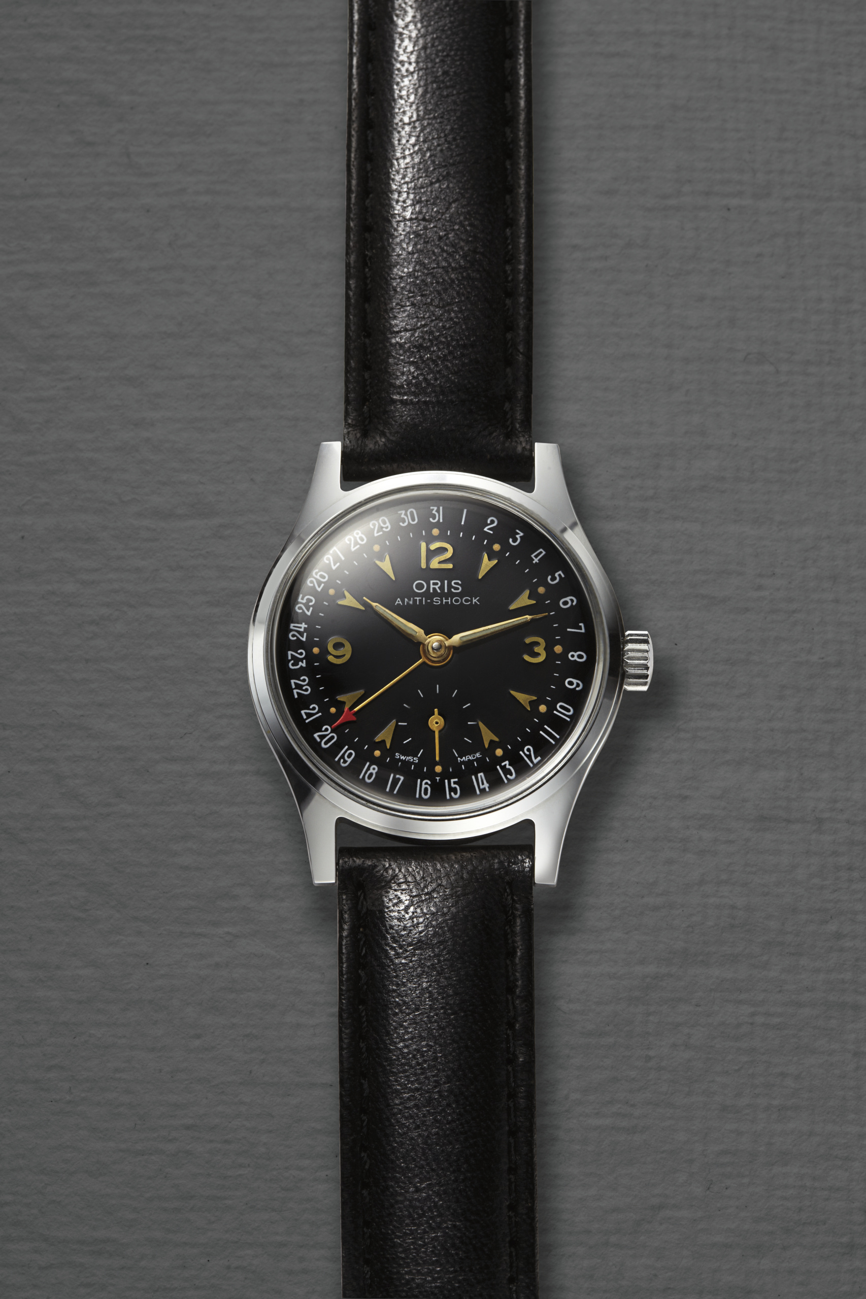 Oris, Schweizer Uhr, Pointer Date 1938 HighRes 1650